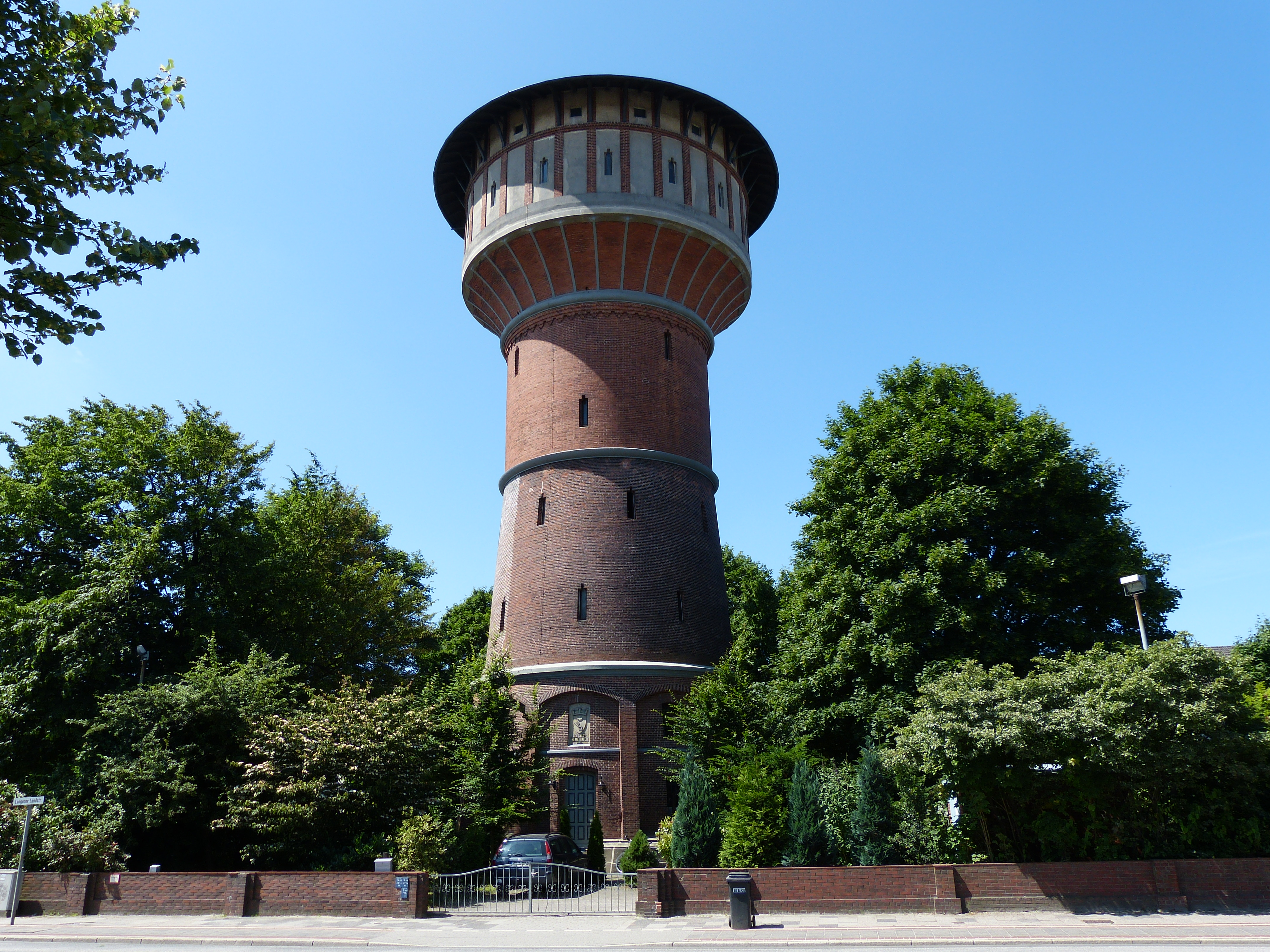 Wasserturm der Stadt Bremerhaven in Bremerhaven, Langener Landstraße 45 Das abgebildete Objekt ist ein geschütztes Kulturdenkmal in der Freien Hansestadt Bremen, mit der Nr. 3381 beim Landesamt für Denkmalpflege registriert.